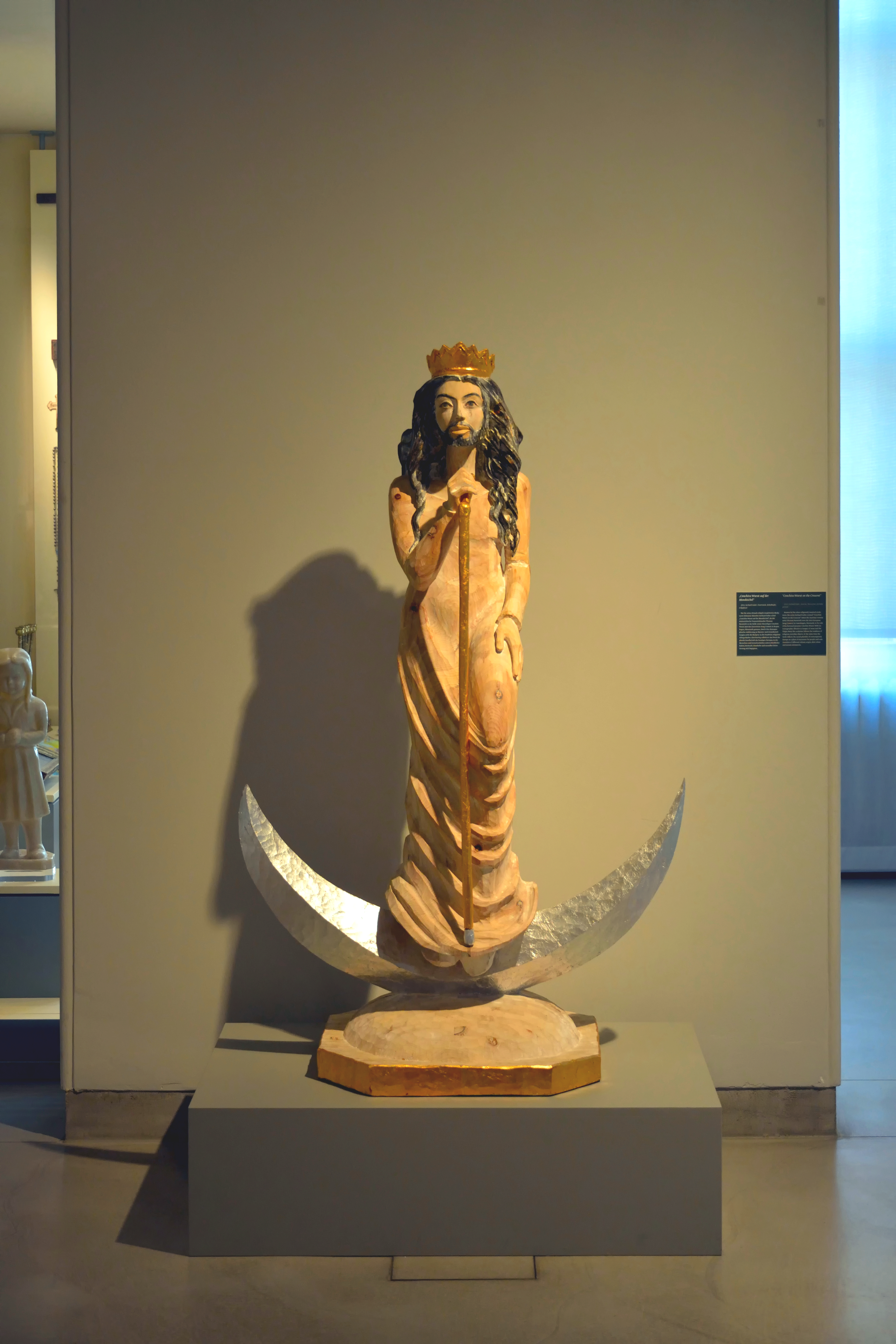 Impressionen aus dem Museum Europäischer Kulturen in BerlinHier: Aktueller Ausstellungsort der Skulptur Conchita Wurst auf der Mondsichel.